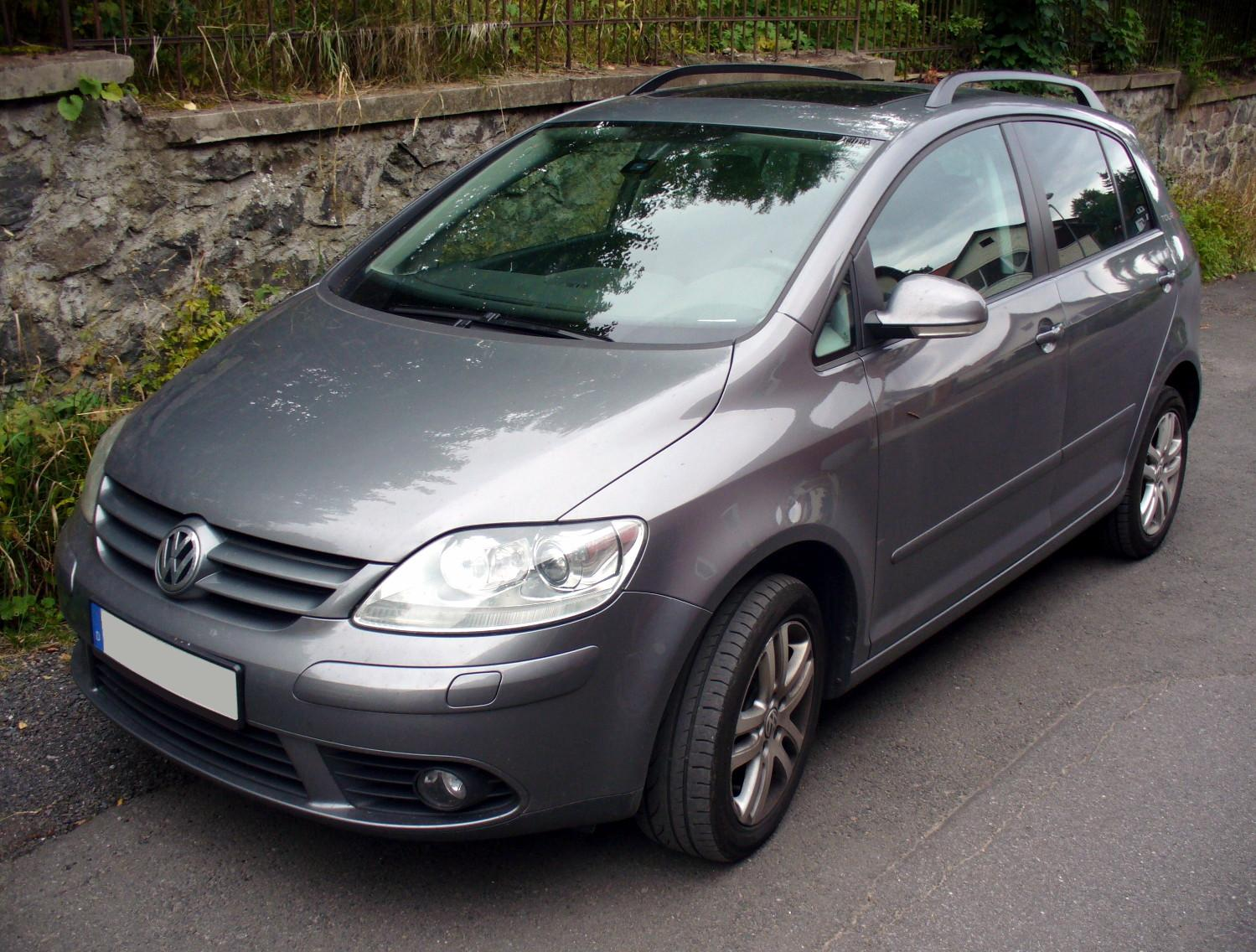 VW Golf Plus